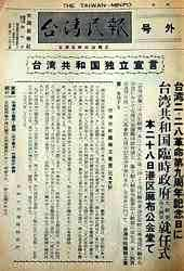 廖文毅等於二二八事件九週年時宣佈台灣共和國臨時政府正式成立於日本東京